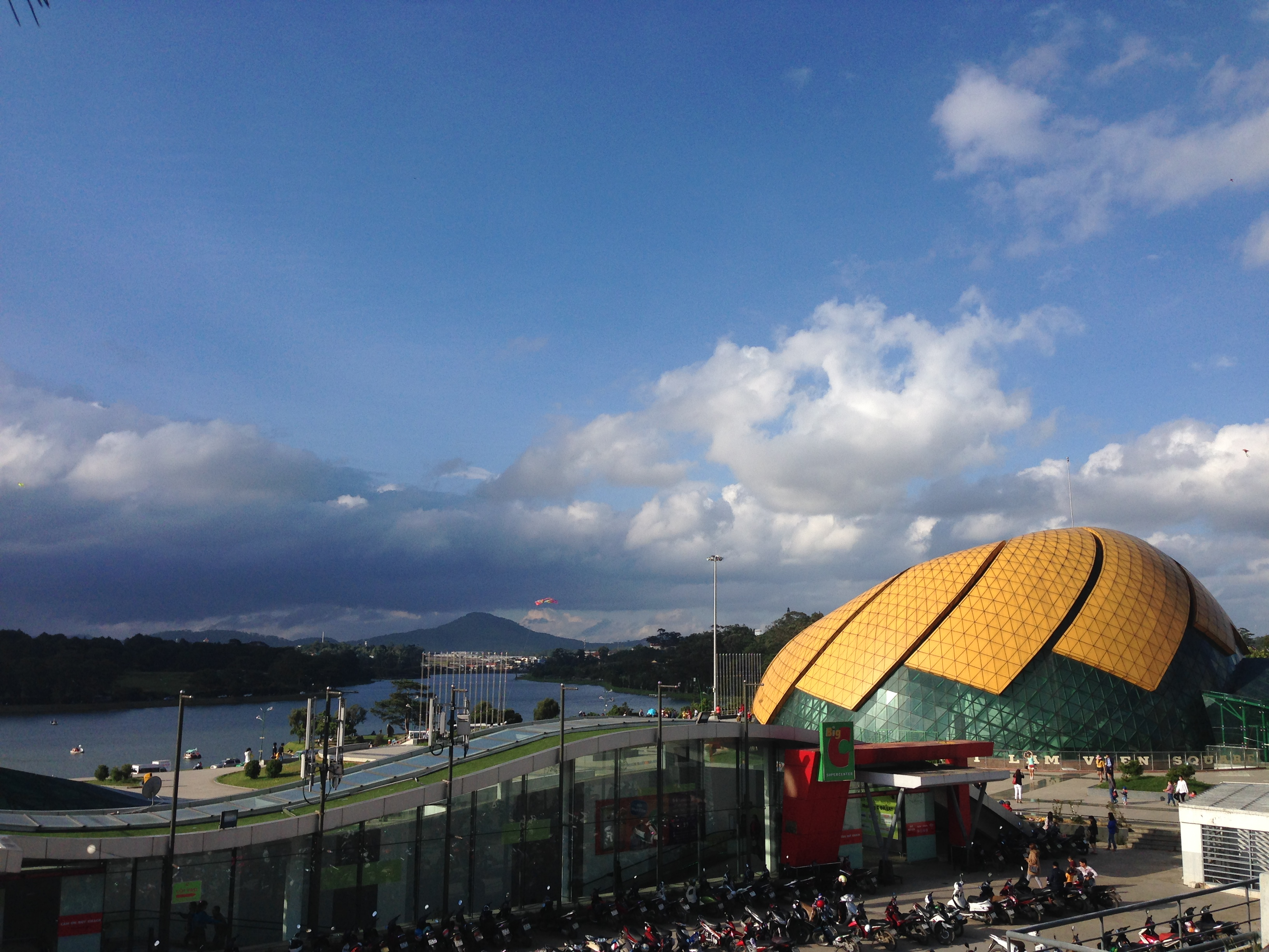 Lạc Dương khác Tam ĐôXuân Hương chẳng phải hồ?Langbiang ngồi than thởNgắm Dã Quỳ ngẩn ngơ.